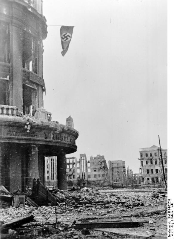 Zentralbild, II. Weltkrieg 1939-45 Die Schlacht an der Wolga, 17.7.1942-2.2.1943 UBz: die Ruine des Warenhauses in Stalingrad, in dessen Kellerräumen sich der Befehlsstab des Oberkommandierenden, Generalfeldmarschall Paulus, befindet. Oktober 1942